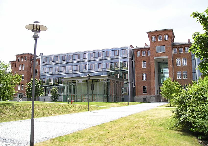 Historisches Gebäude im Justizzentrum Meiningen, hier sind einige Gerichte untergebracht